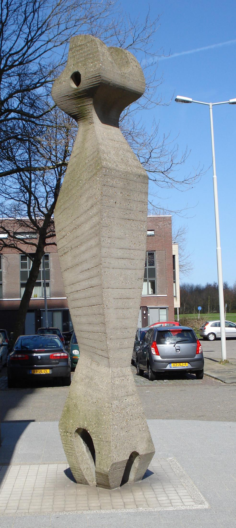 Rotterdam Ommoord, Söderblomplaats. Kunstwerk zonder titel van George van der Wagt. Rotterdam/The Netherlands.